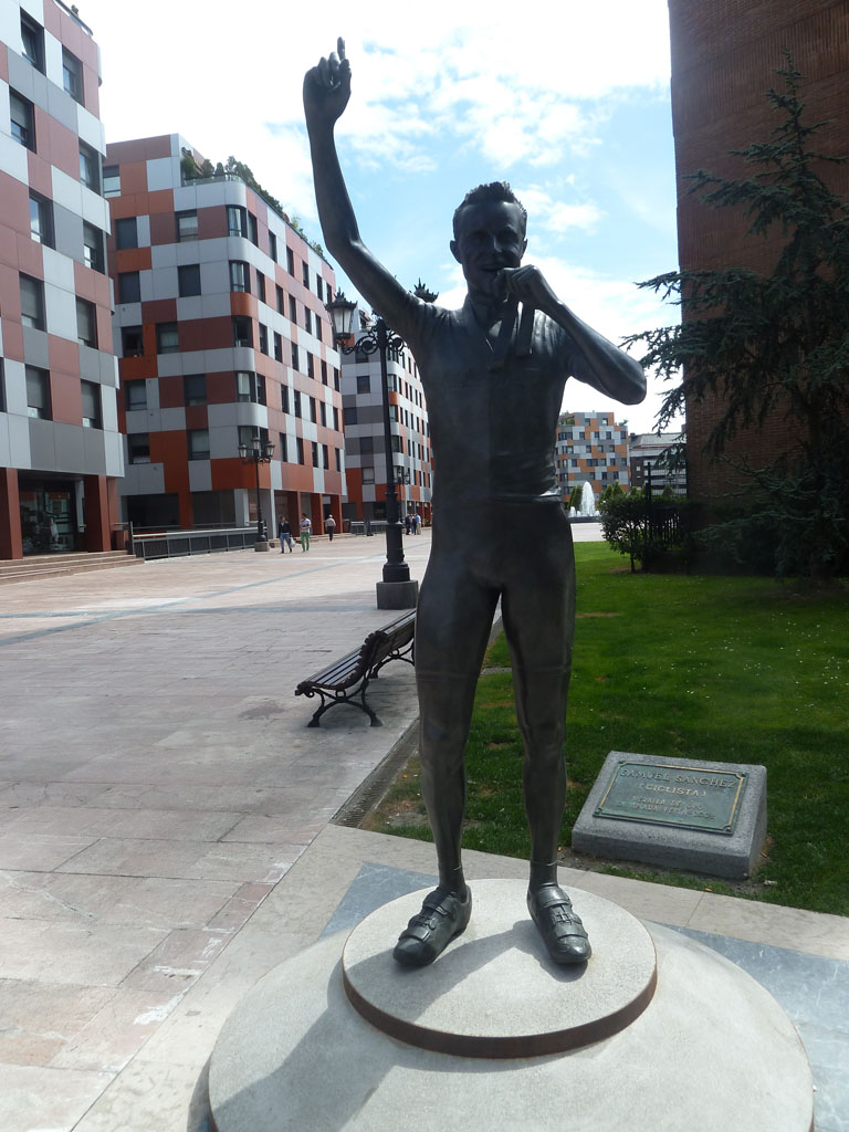 Medalla de Oro en los Juegos Olímpicos de Pekin 2008 y Rey de la Montaña en el Tour de Francia 2011.